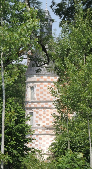 Prieuré de Bouche d'Aigre, une des tours du chateau, renaissance avec un beau parement briques et pierres de taille blanches et avec un clocheton très haut; entre des arbres